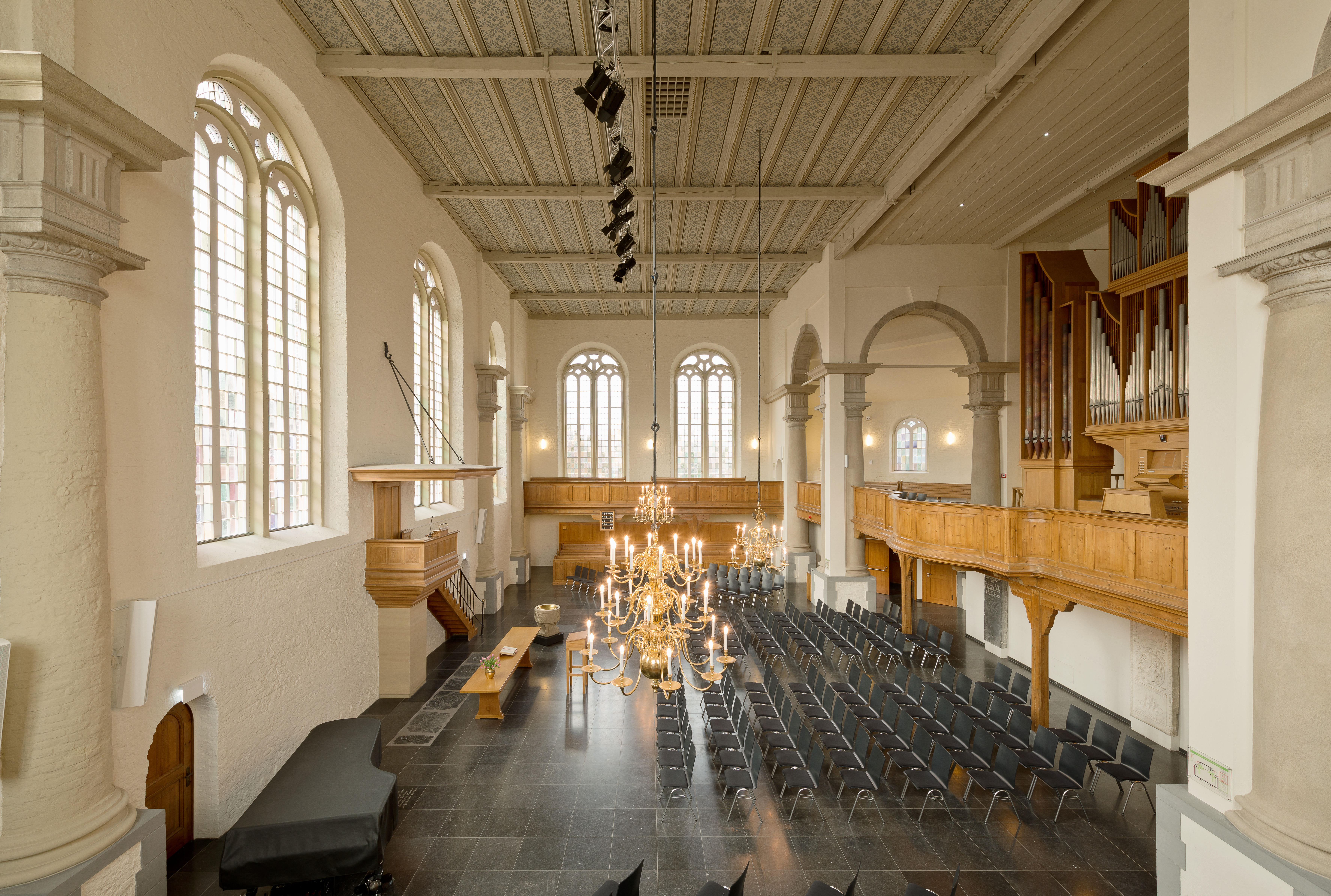 Ostansicht der Neuen Kirche Emden, Ostfriesland, Niedersachsen, Deutschland